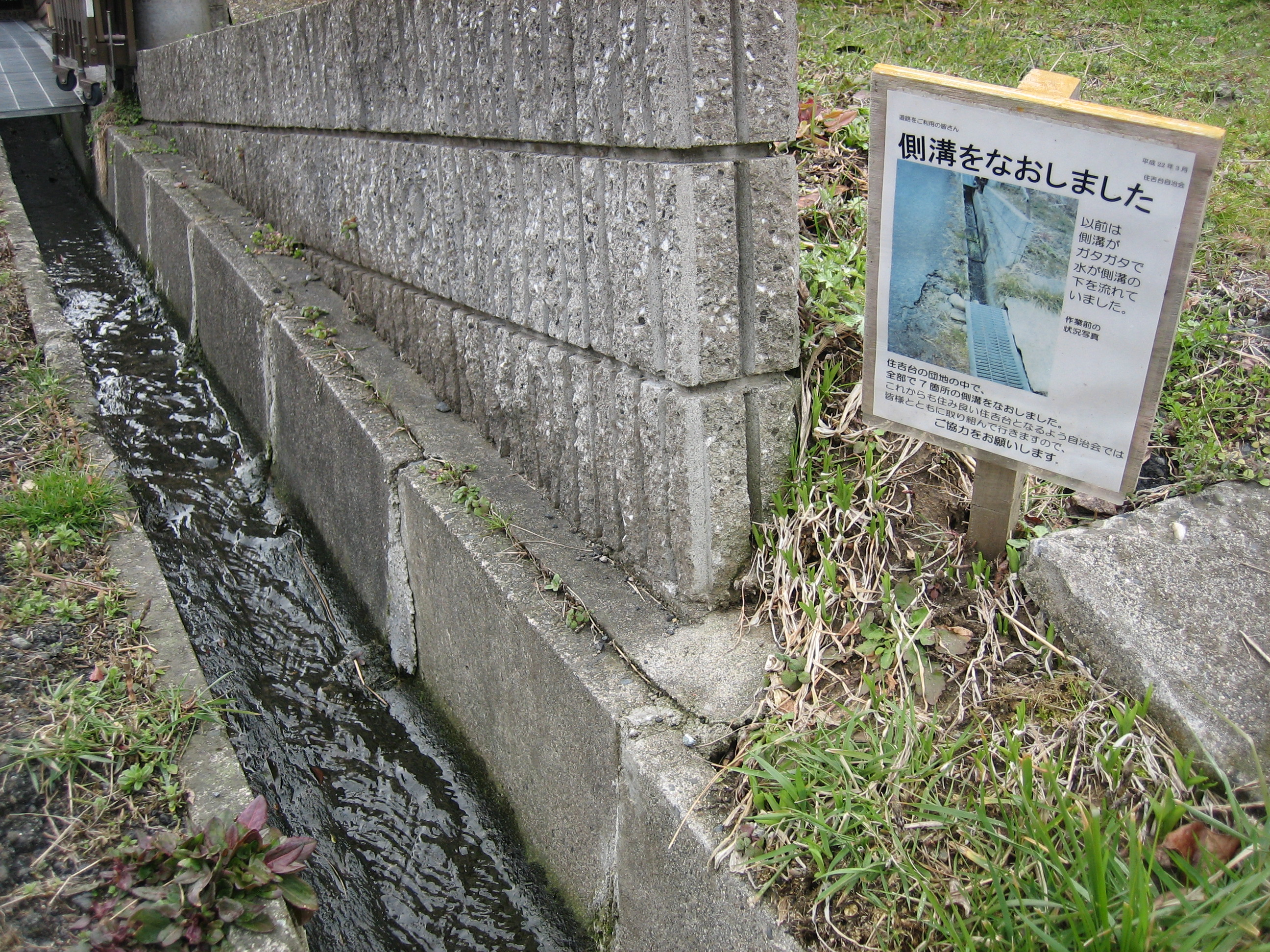 滋賀県大津市和邇北浜から住吉台地区内を撮影